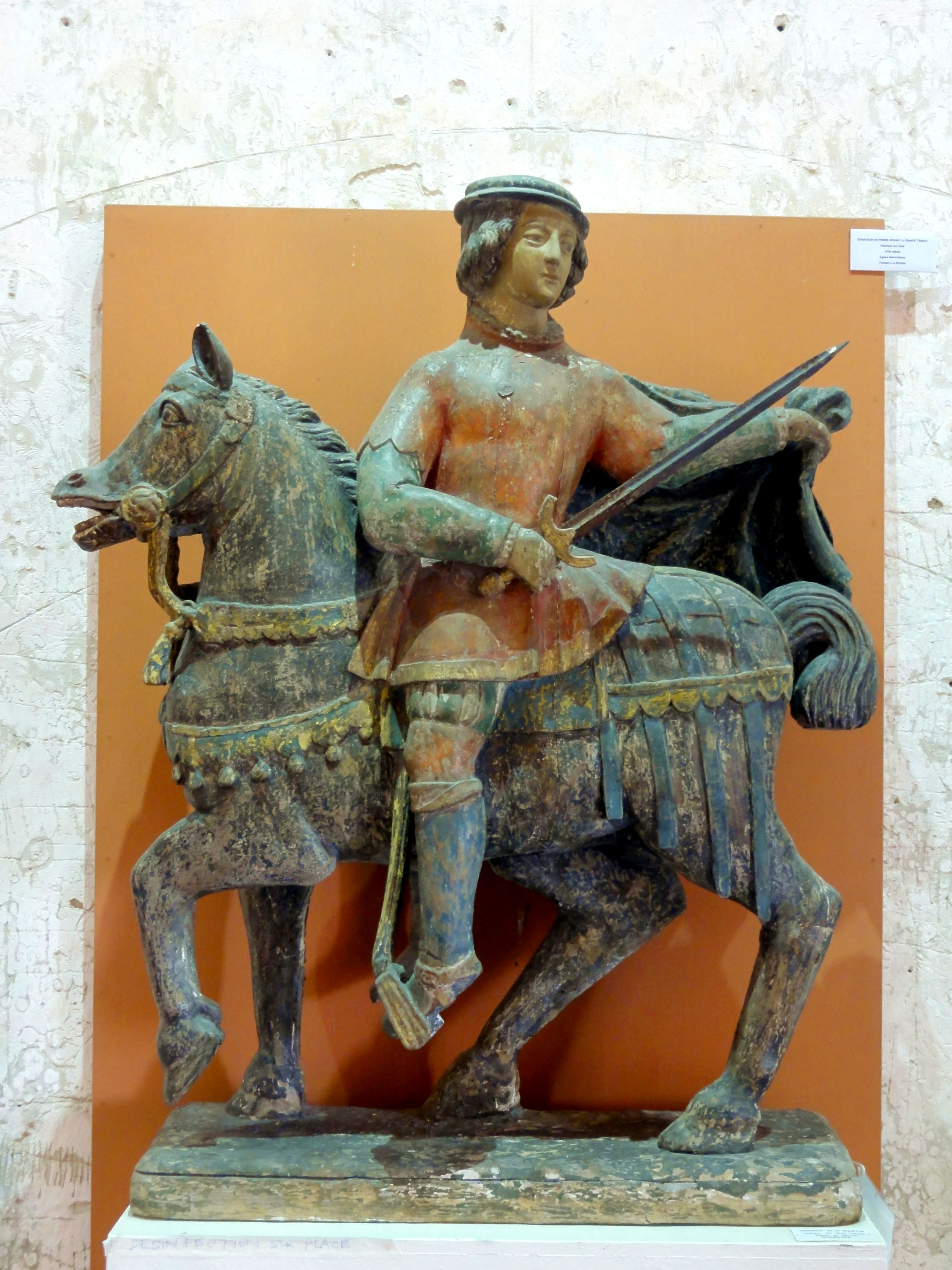 Charité de Saint-Martin, milieu XVIe s.